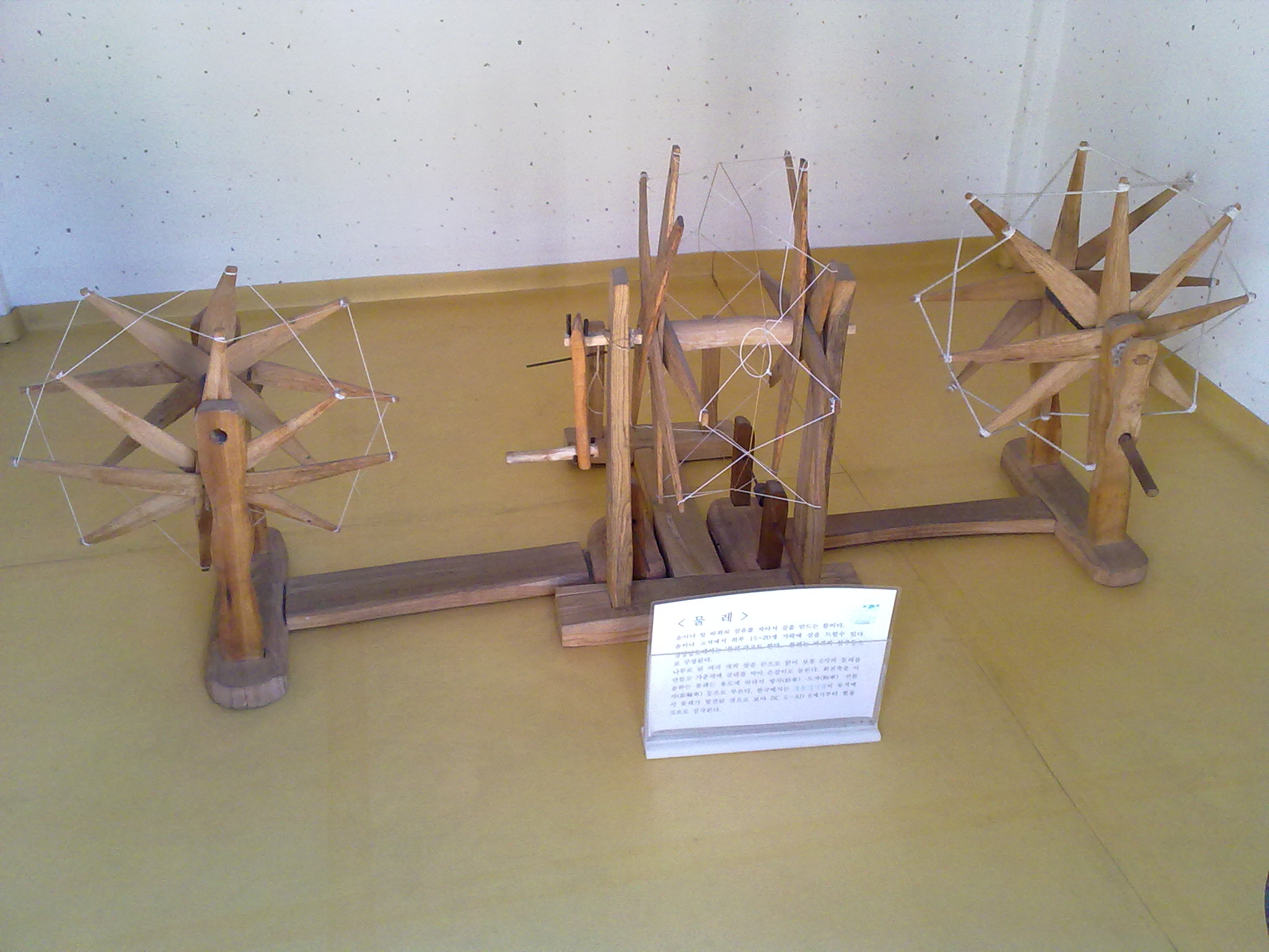 인천도호부청사 물레